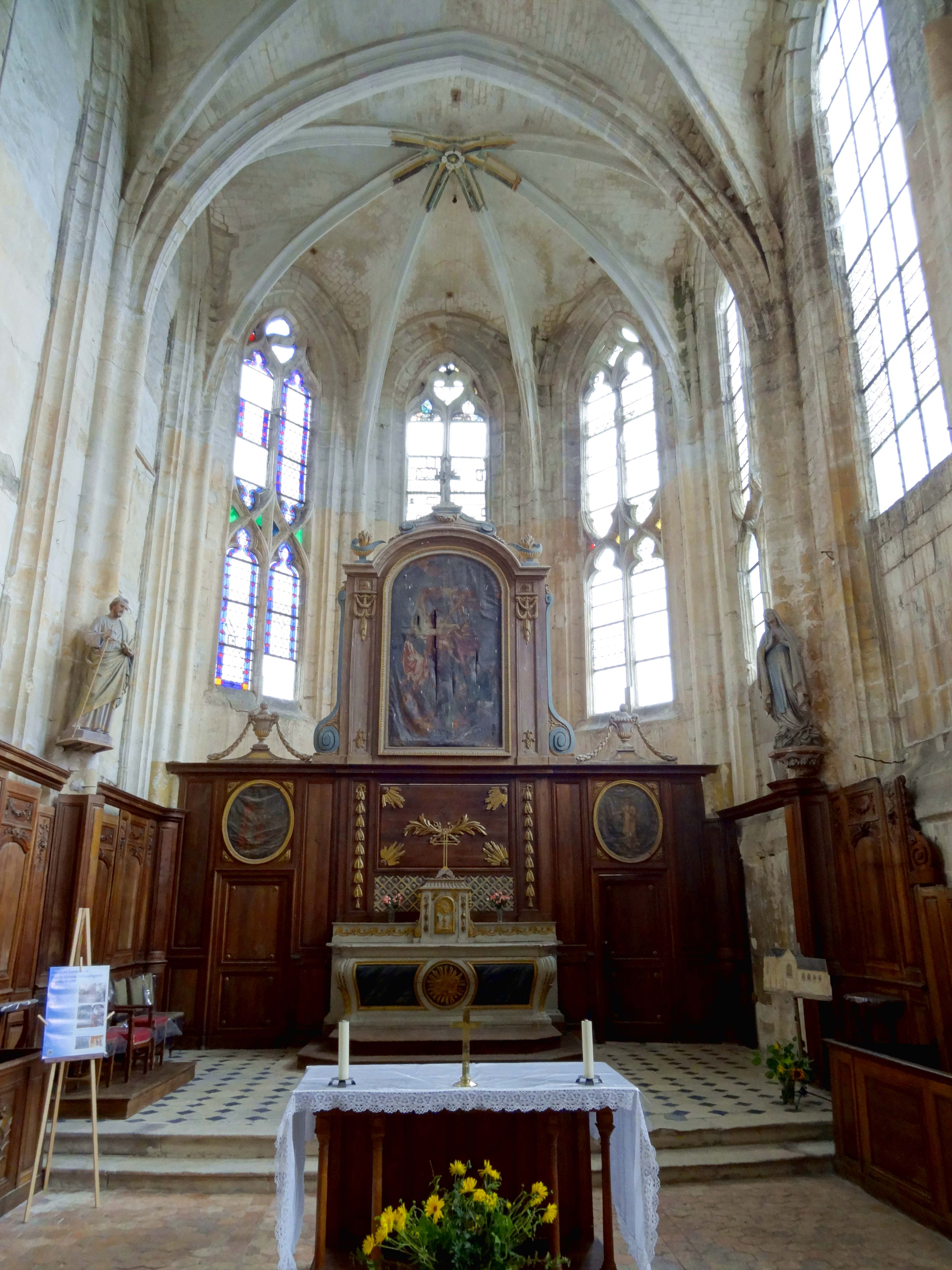 Intérieur de l'église - voir titre.